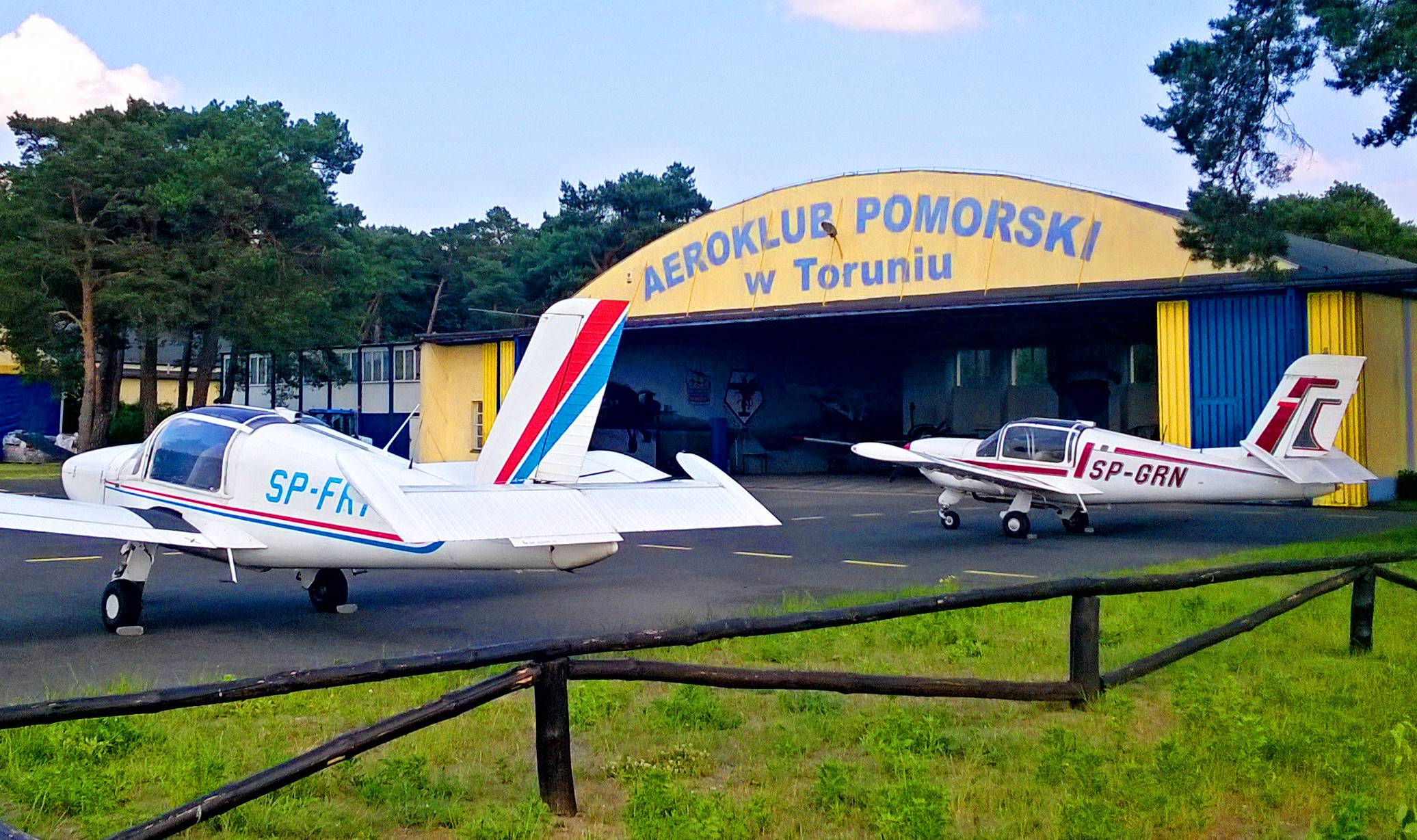 Hangar na lotnisku sportowym w Toruniu